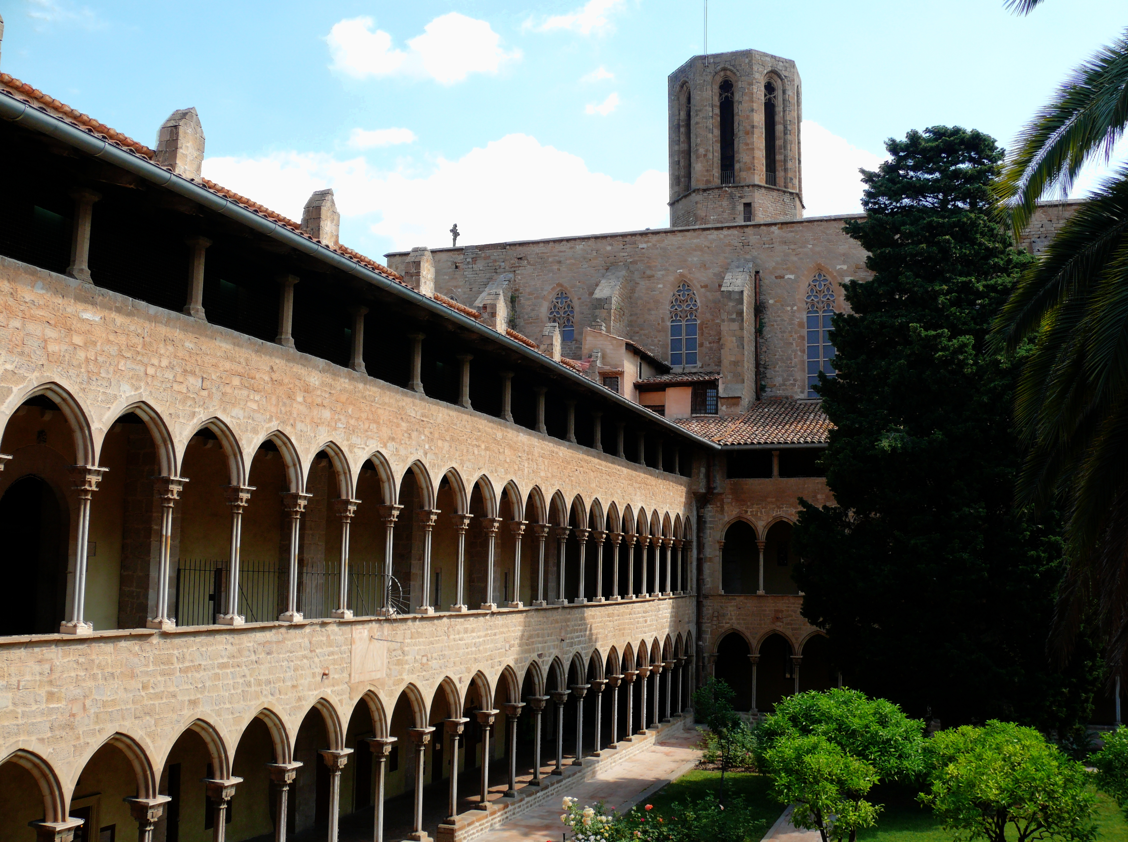 Monestir de Santa Maria de Pedralbes (Barcelona)